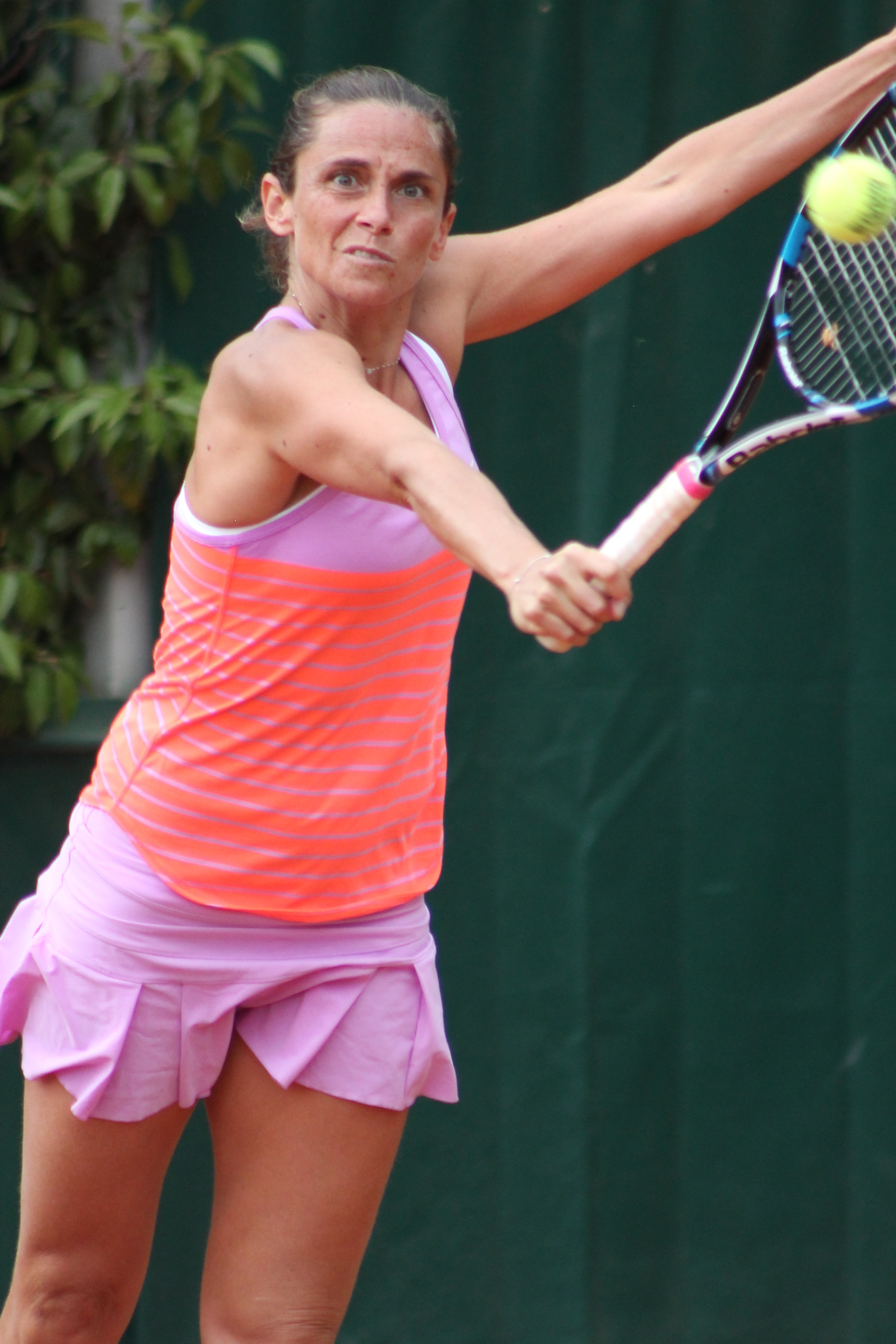 Vinci RG15 (4)